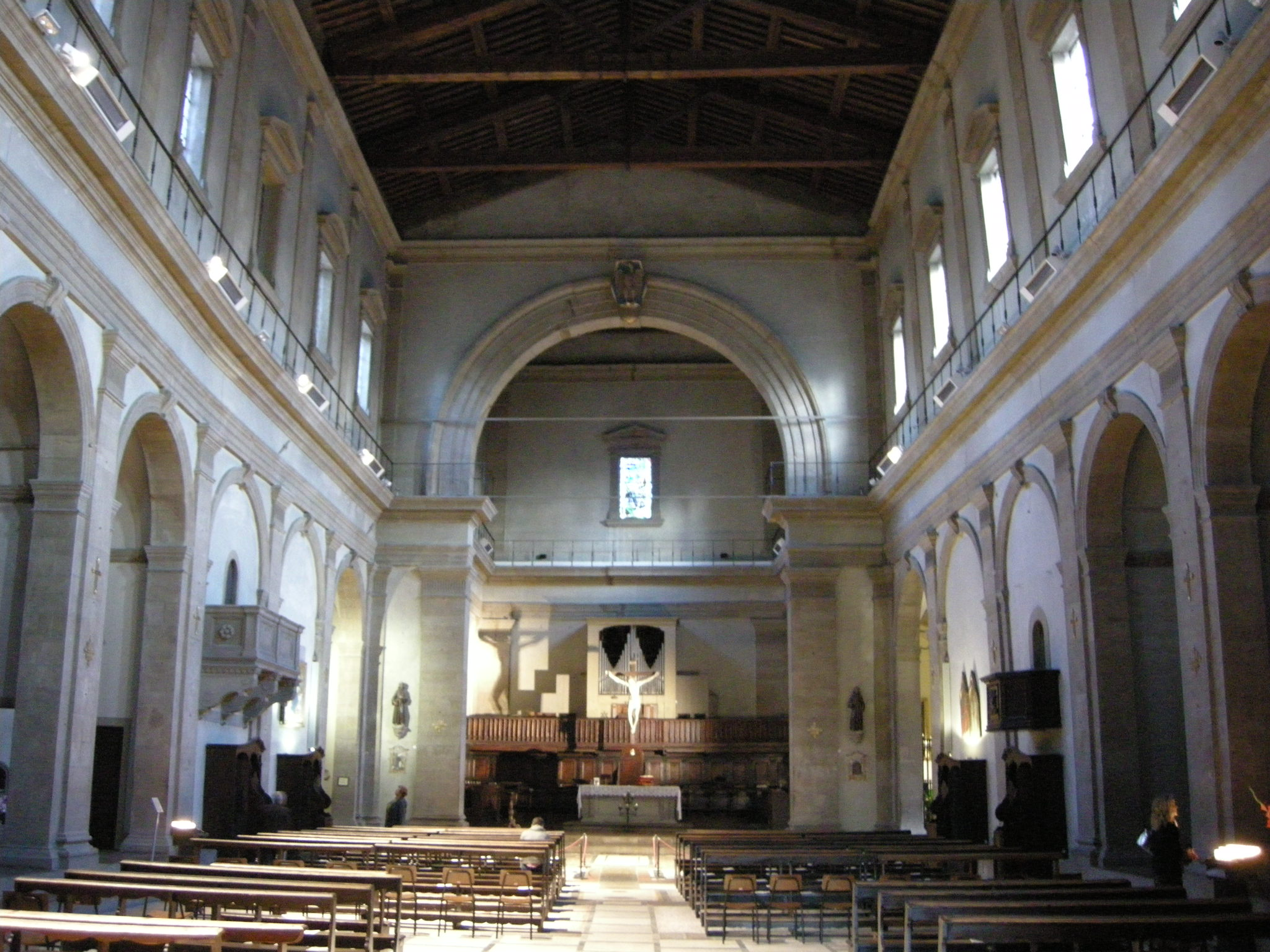 San salvatore al monte, interno